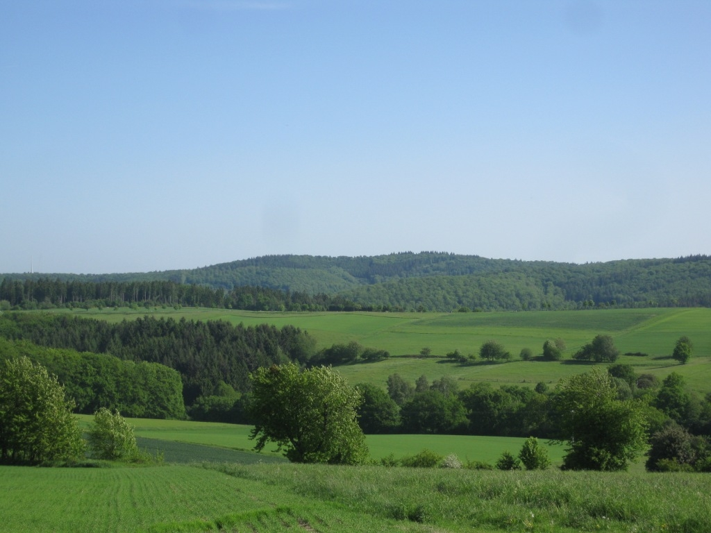 Neunzehntberg im westlichen Hintertaunus aus Richtung Taunuskamm